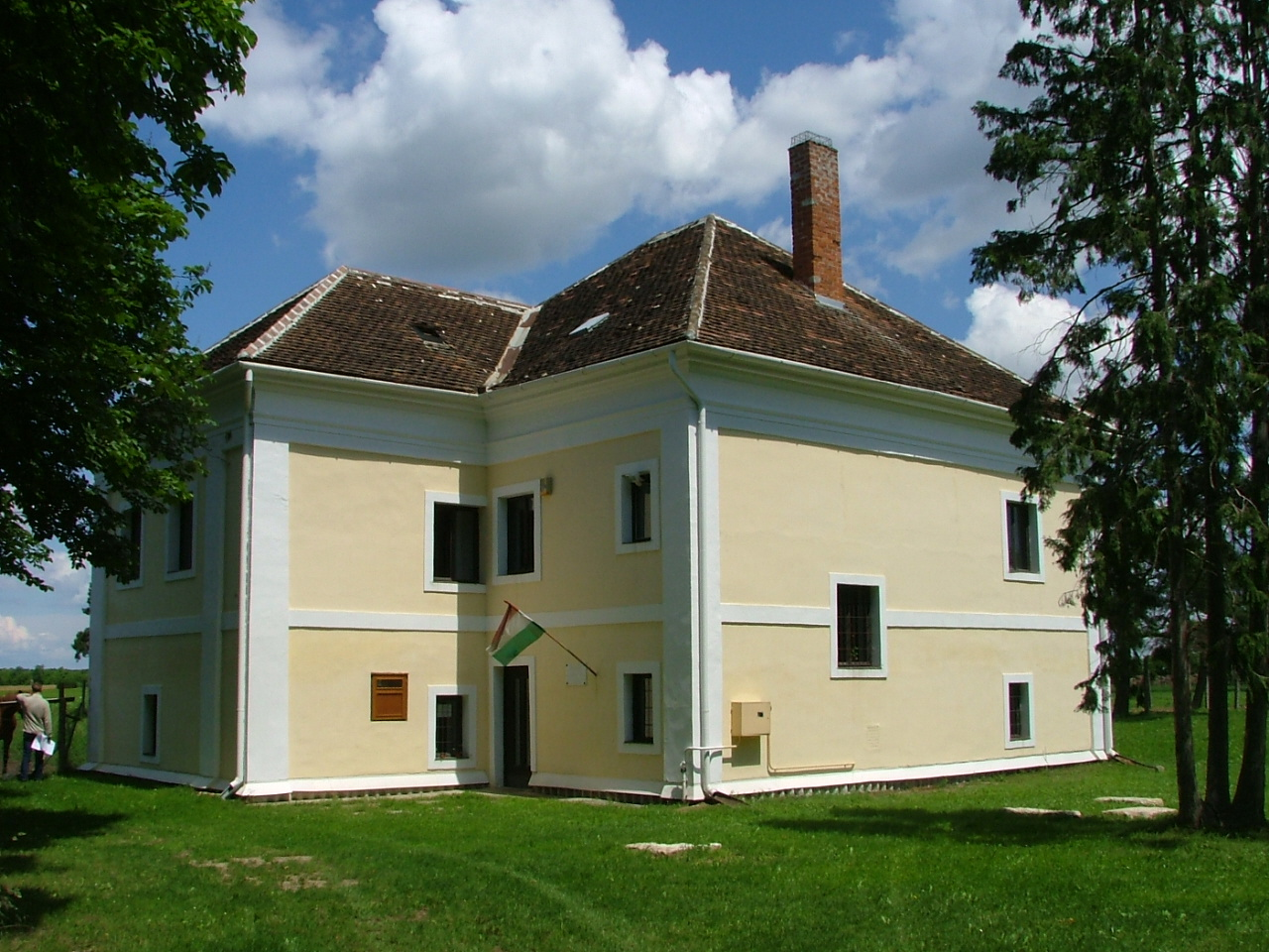 Schloß Sarlay-Balogh in Csempeszkopács